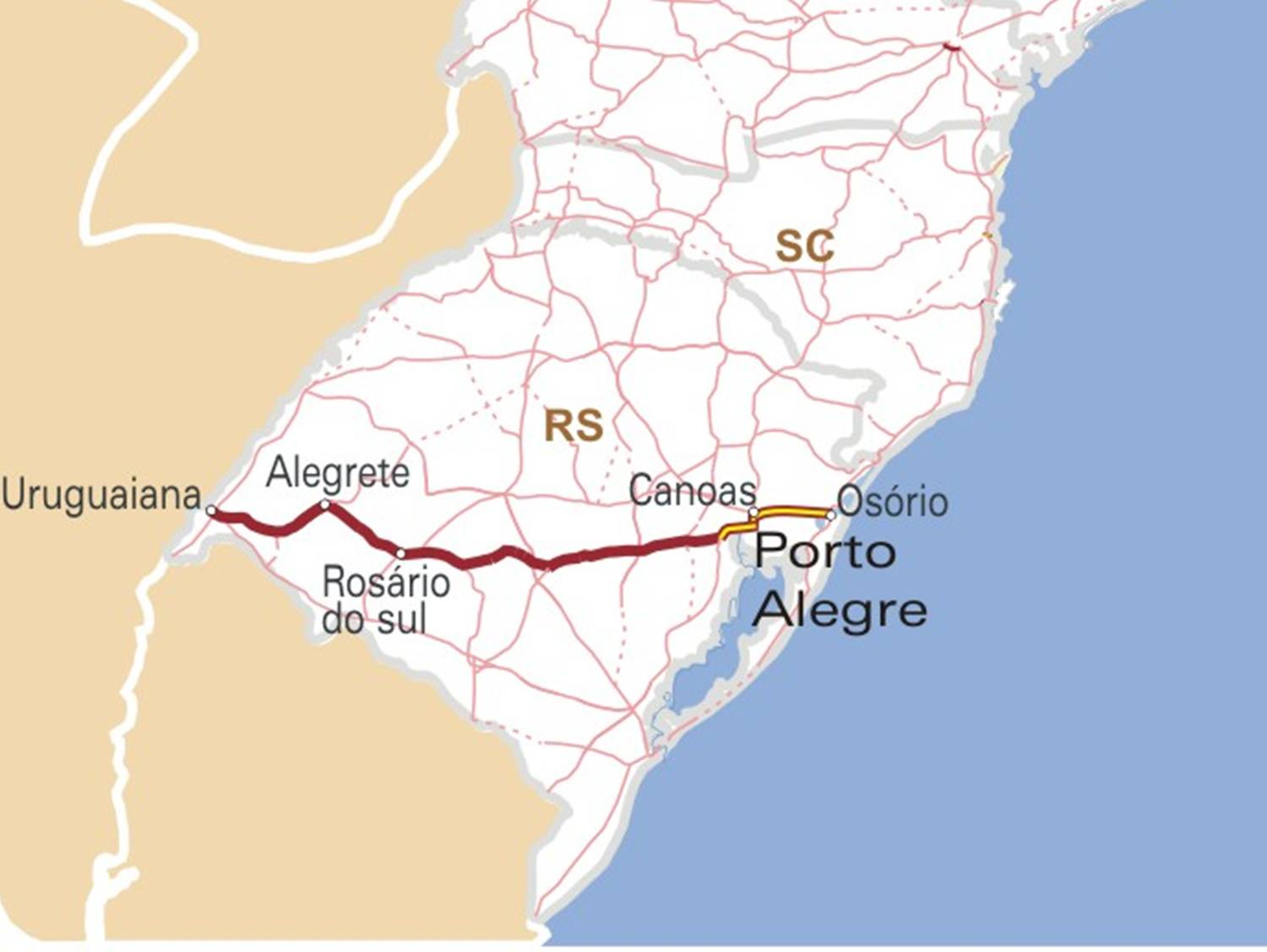 Mapa descritivo da BR-290 em relação as outras rodovias brasileiras.